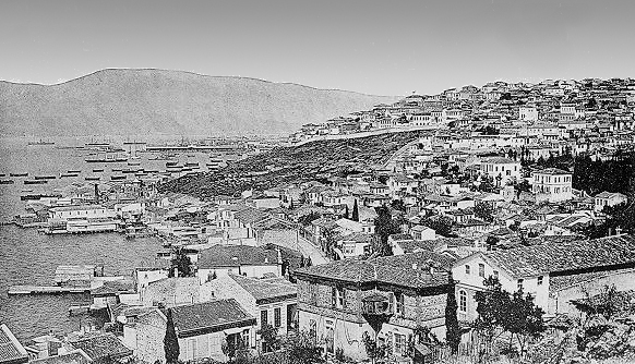 Karataş, İzmir, a suburb of :en:İzmir, circa 1900s